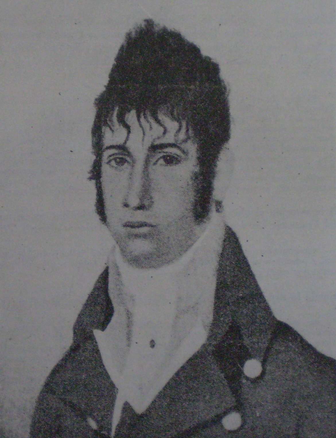 Coronel José de Moldes